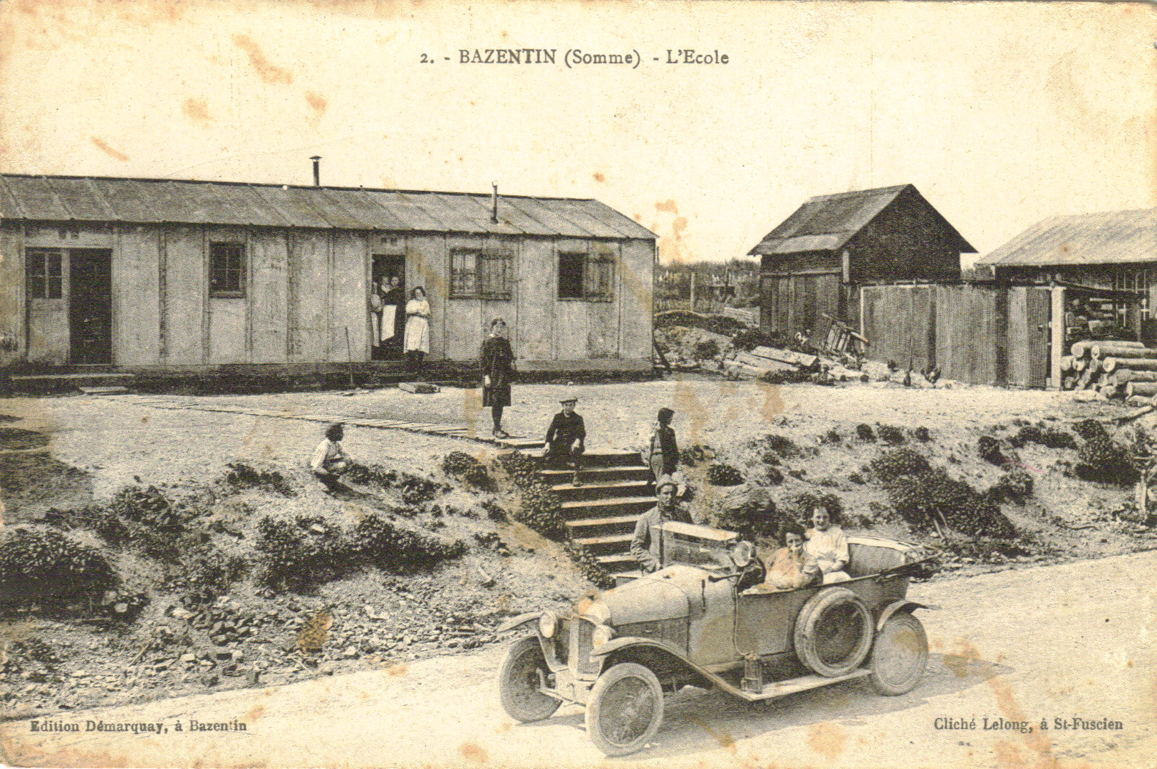 Bazentin (Somme, Picardie, France)